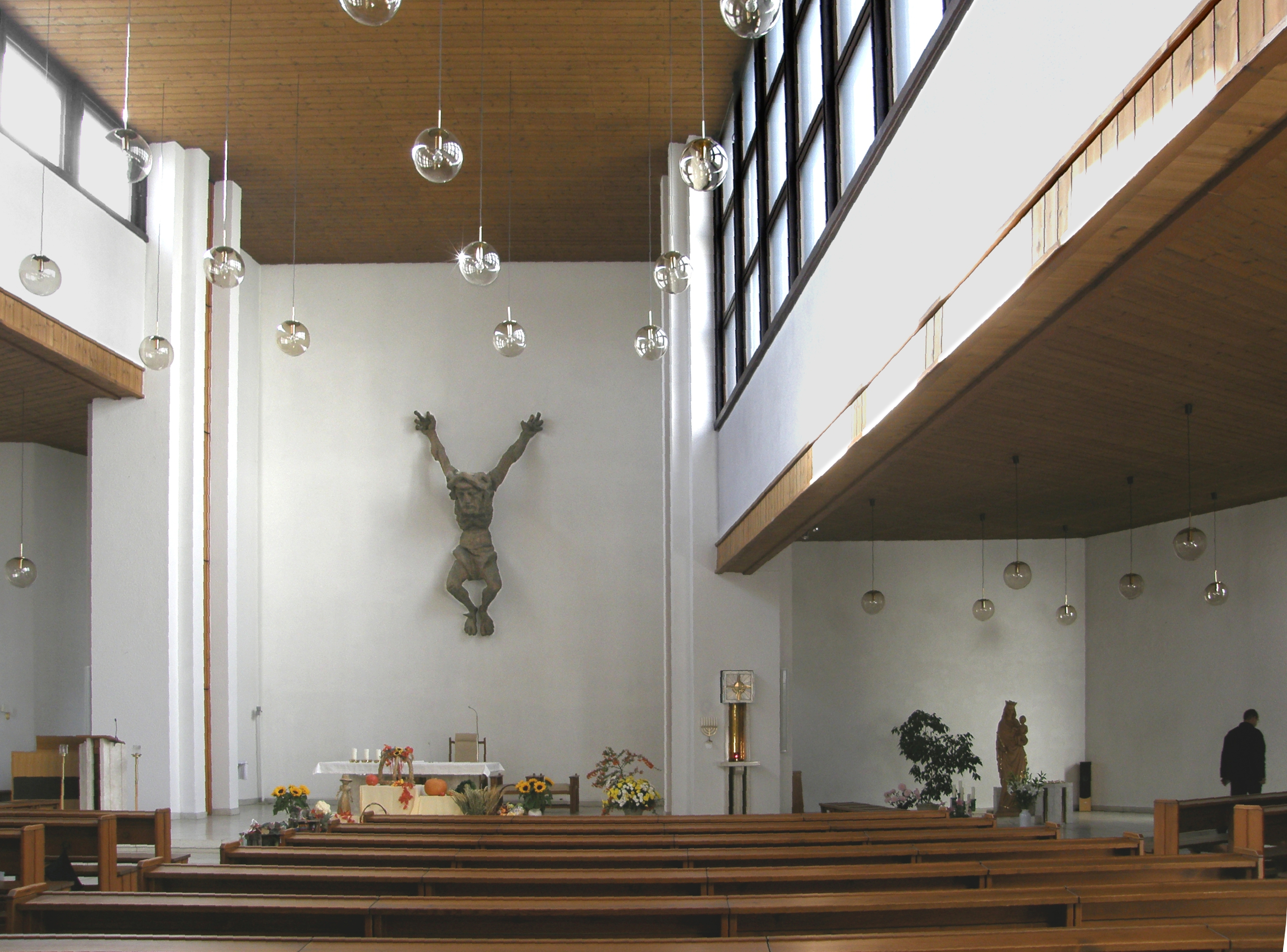 Kirche in Berlin-Marzahn: Innenraum (1)